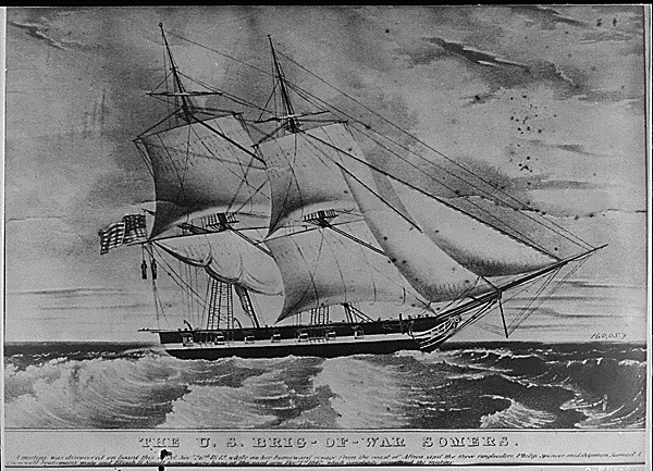 Le brick-goélette américain Somers